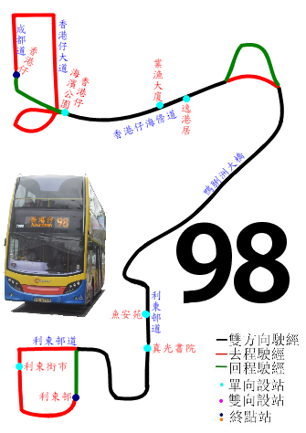 中文（香港）: 城巴98路公車的走線圖